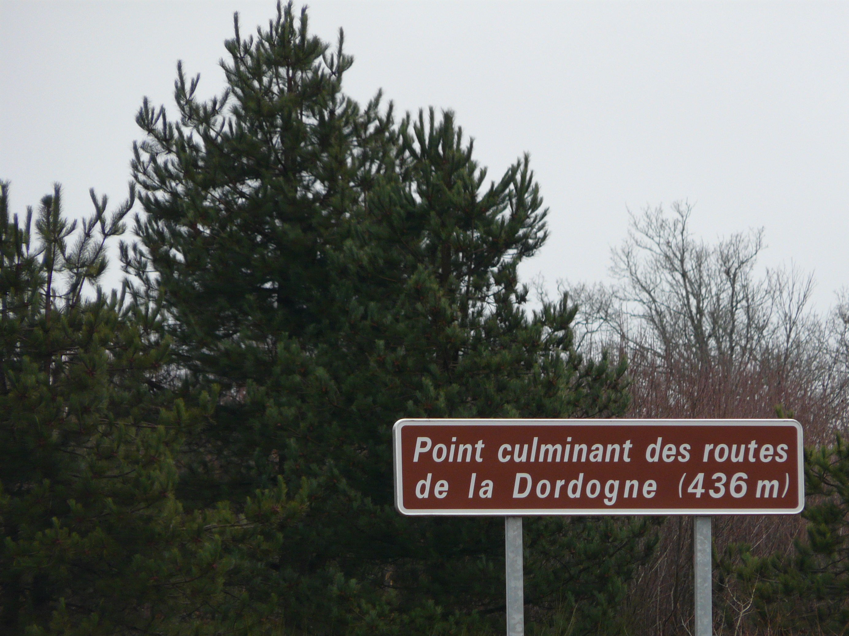 Panneau sur la route nationale 21 signalant le point culminant des routes de la Dordogne, en limites de Firbeix et Saint-Pierre-de-Frugie.